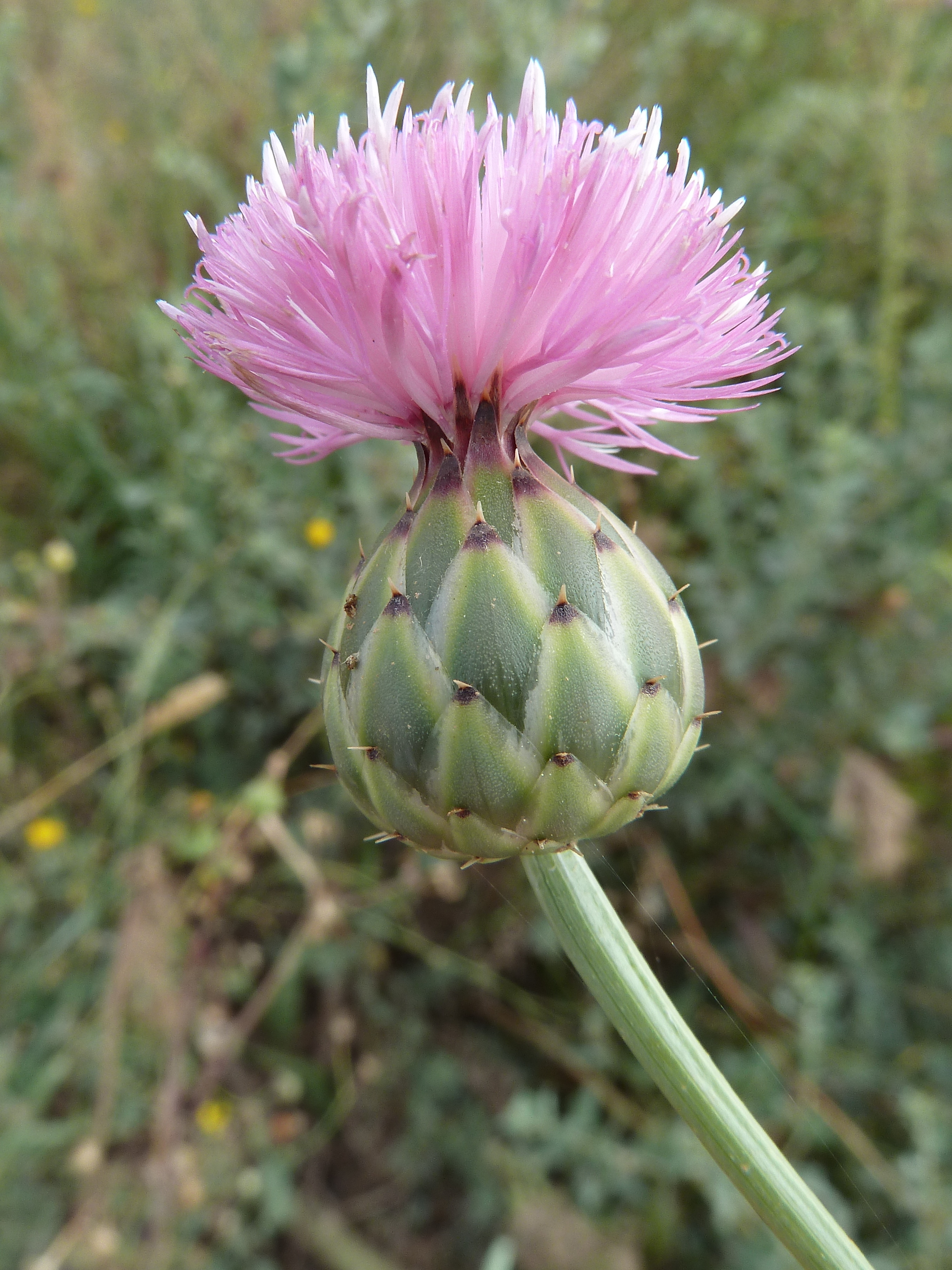 Mantisalca salmantica (cabezuala,pan de pastor, escobillas, ...) - Capítulo en antesis - Camino de Elche, Albatera (Provincia de Alicante, España).